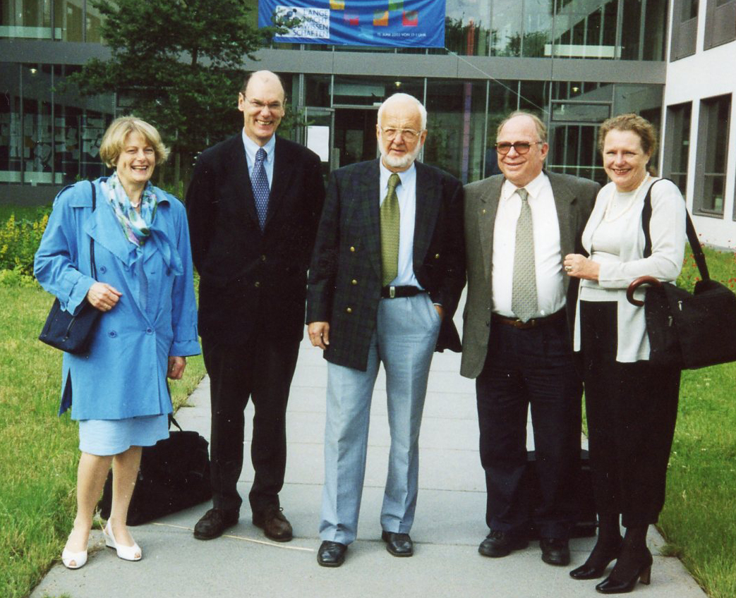 Oehme, Peter (Mitte) anlässlich seines 65. Geburtstages vor dem FMP